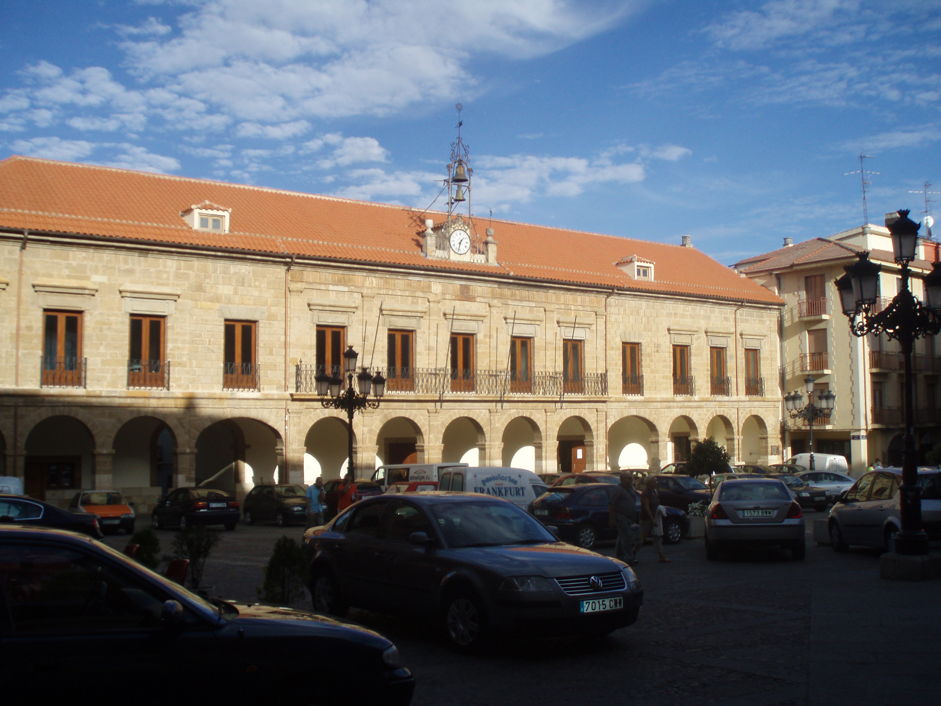 Ayuntamiento de Benavente. (Zamora).